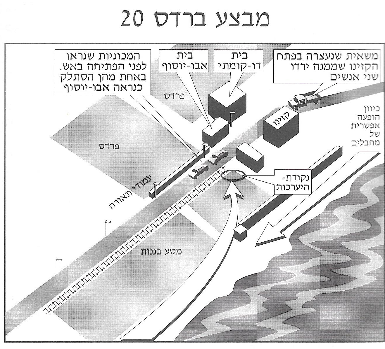 תרשים פעולת שייטת 13 במבצע ברדס 20 15 בינואר 1971.